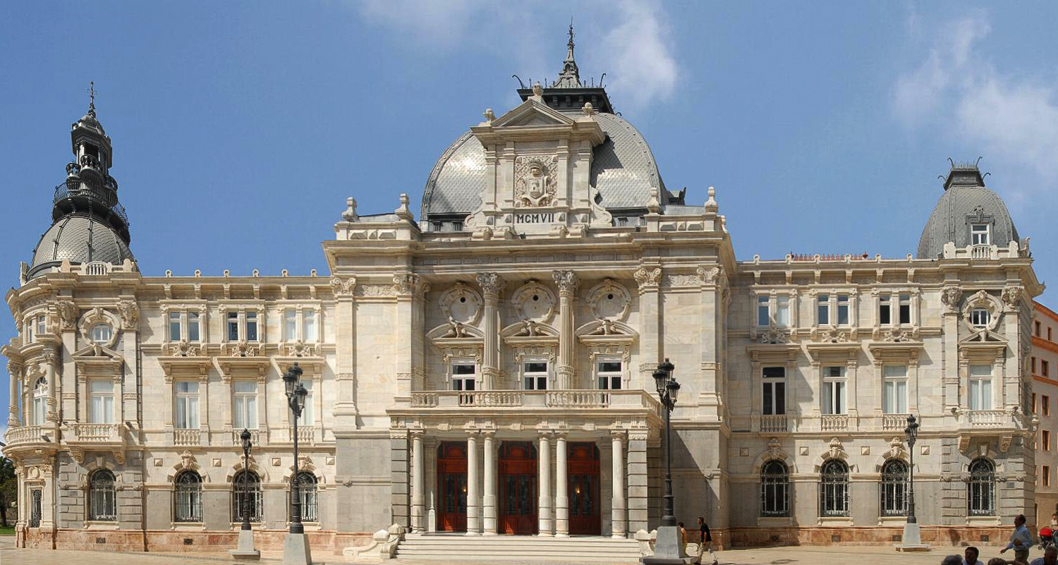 Ayuntamiento de Cartagena (España)/ City Hall Cartagena (Spain)